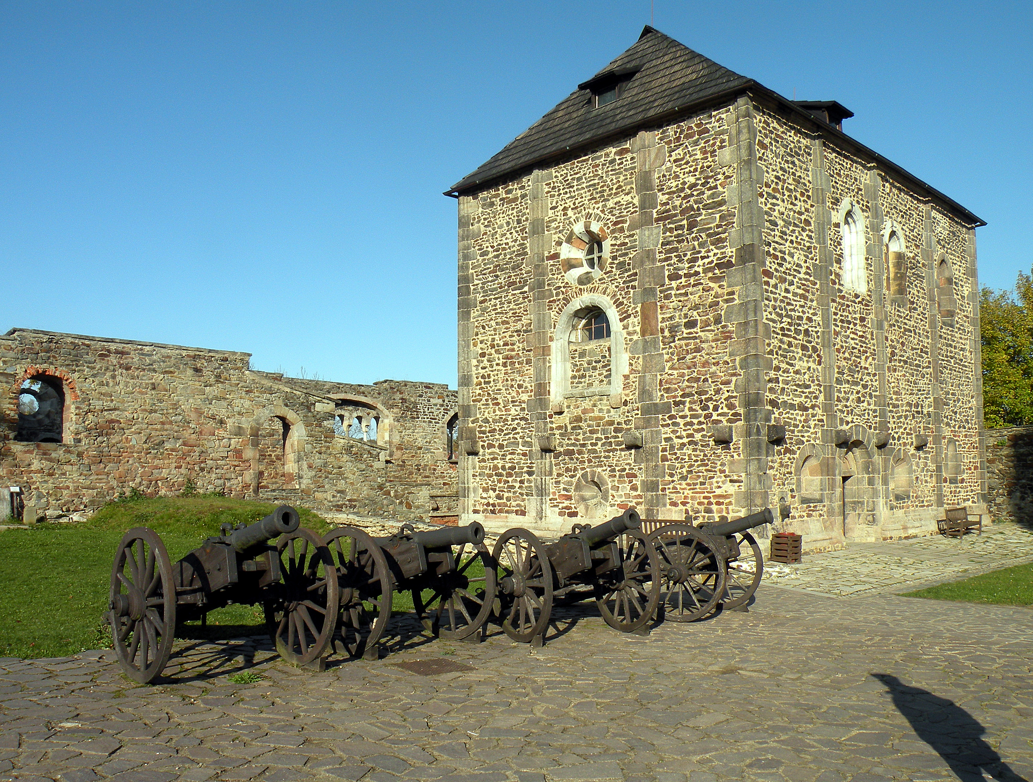 Хеб (Эгер).Замок.Двойная _капелла